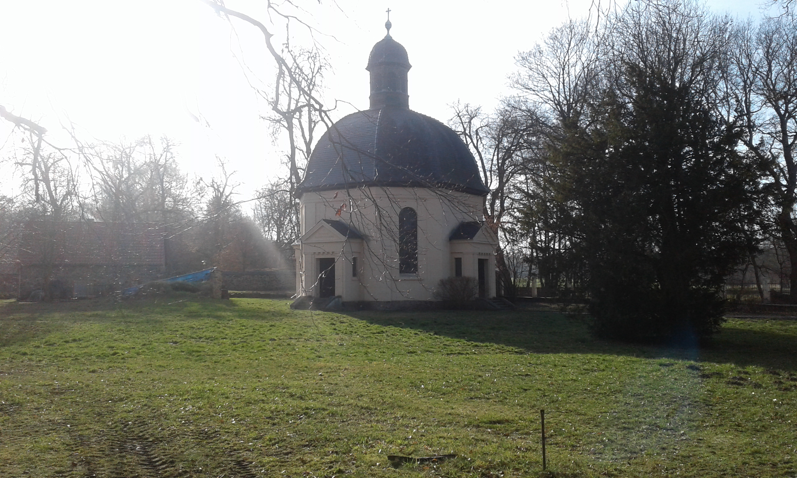 Kapelle